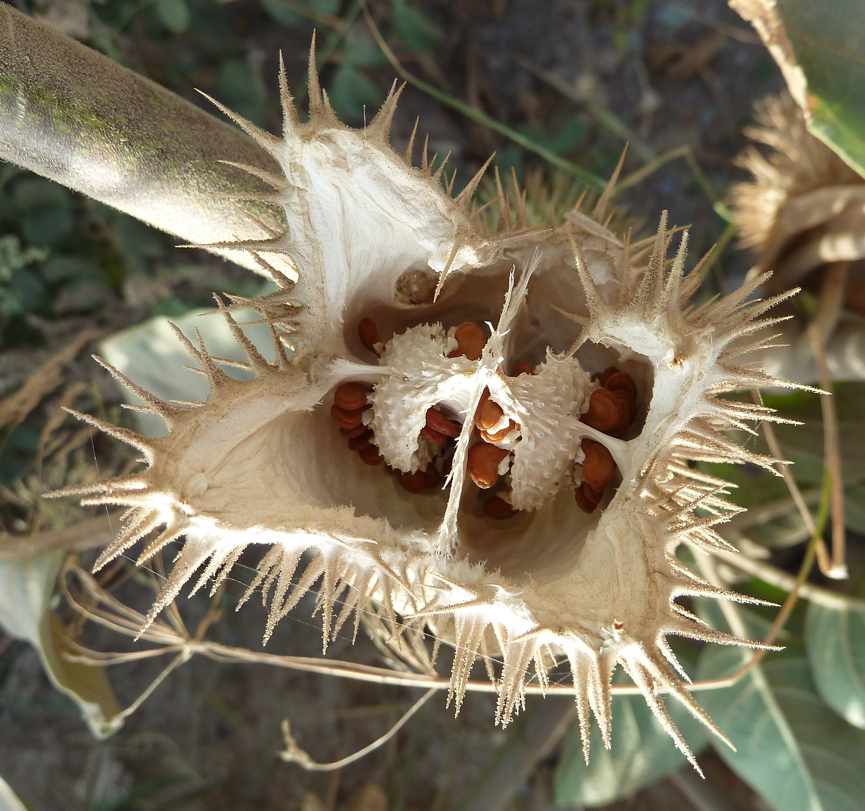 Datura innoxia : Fruto maduro abierto, dejando ver las tabiques de placentación y unas semillas aún fijadas en ellos - Rambla del Charco, Águilas (Murcia, España).